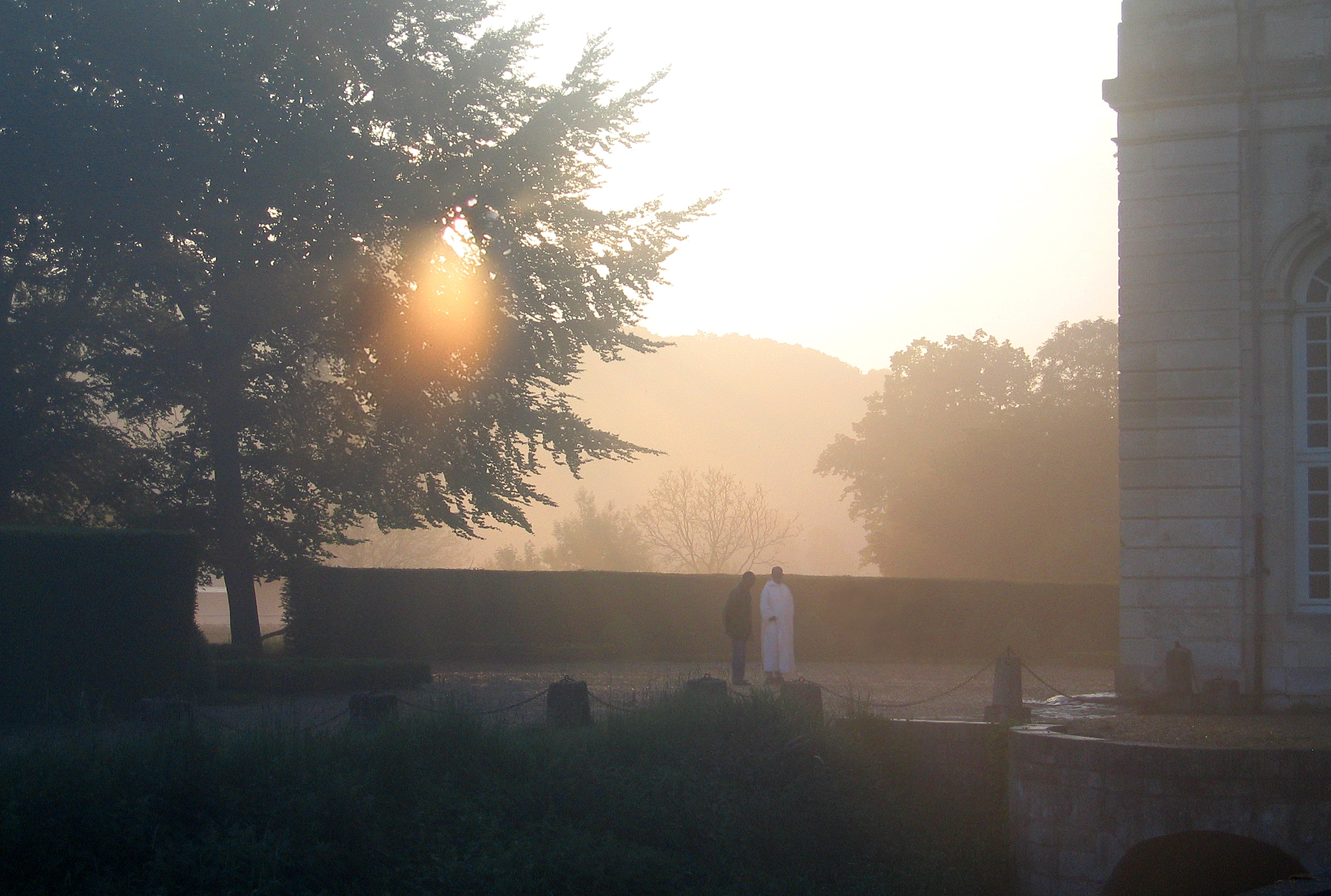 Moine de l'abbaye du Bec Hellouin au coucher du soleil.